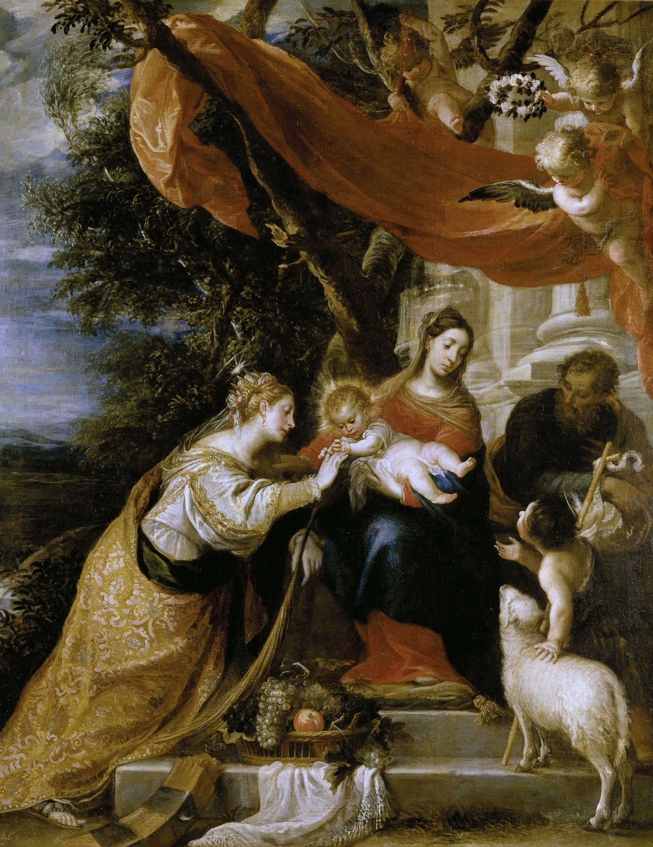 La obra representa los desposorios místicos de Santa Catalina de Alejandría, vírgen y mártir.